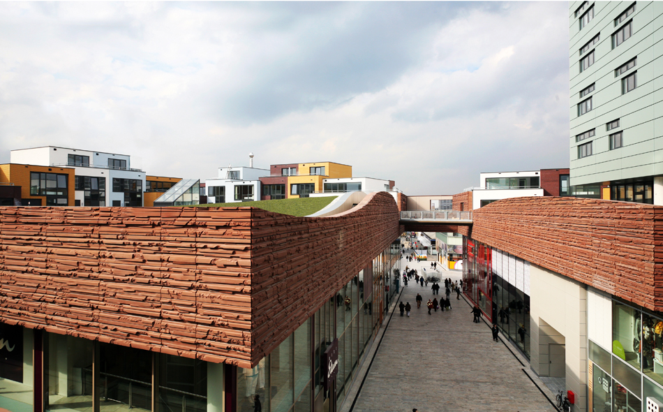 Atelier Christian de Portzamparc